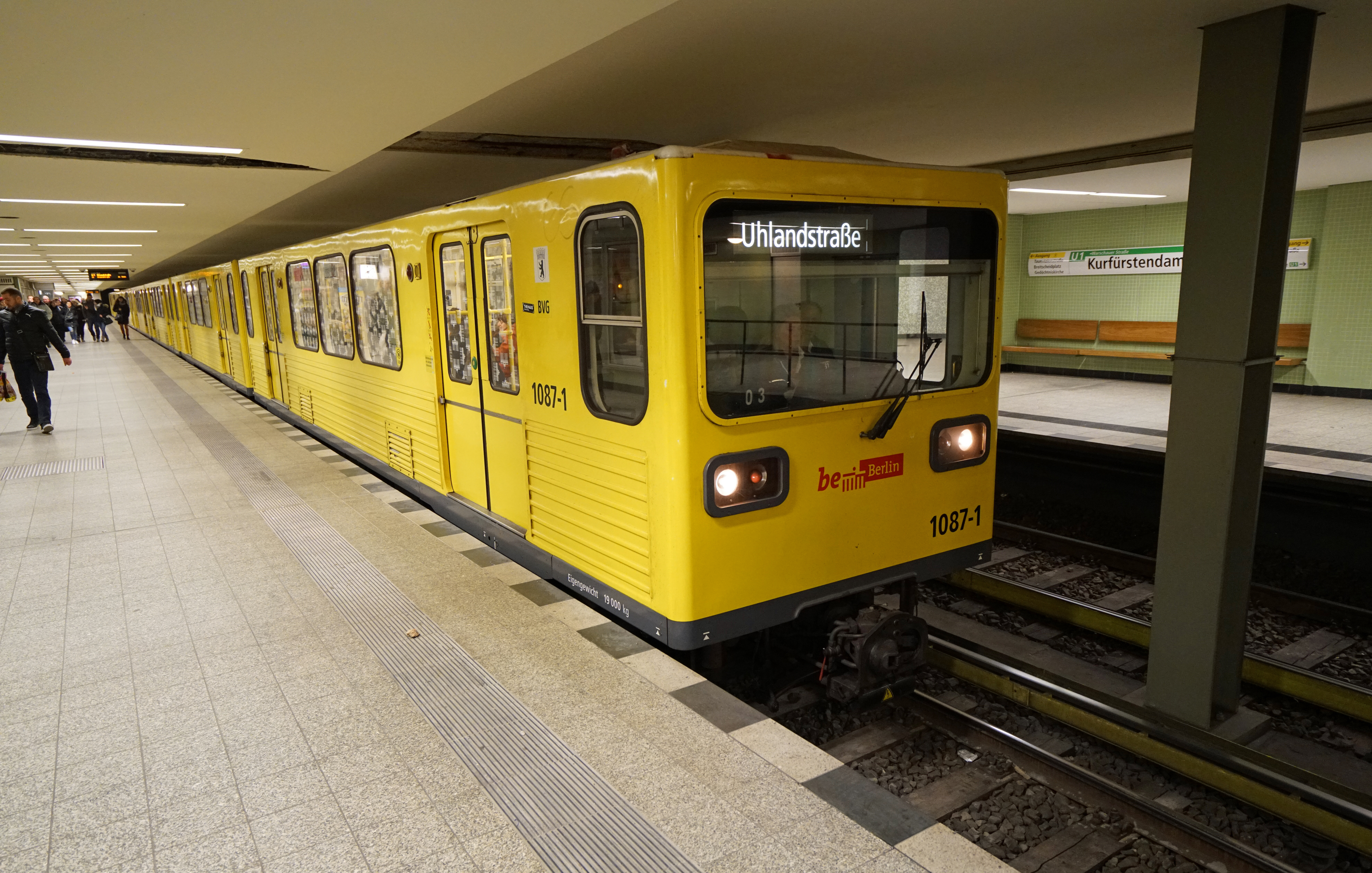 BVG-Baureihe GI/1E (1087-1) im U-Bahnhof Kurfürstendamm (U1) im Einsatz für die U-Bahn Berlin auf der U-Bahnlinie 1 auf dem Weg zum U-Bahnhof Uhlandstraße in Berlin